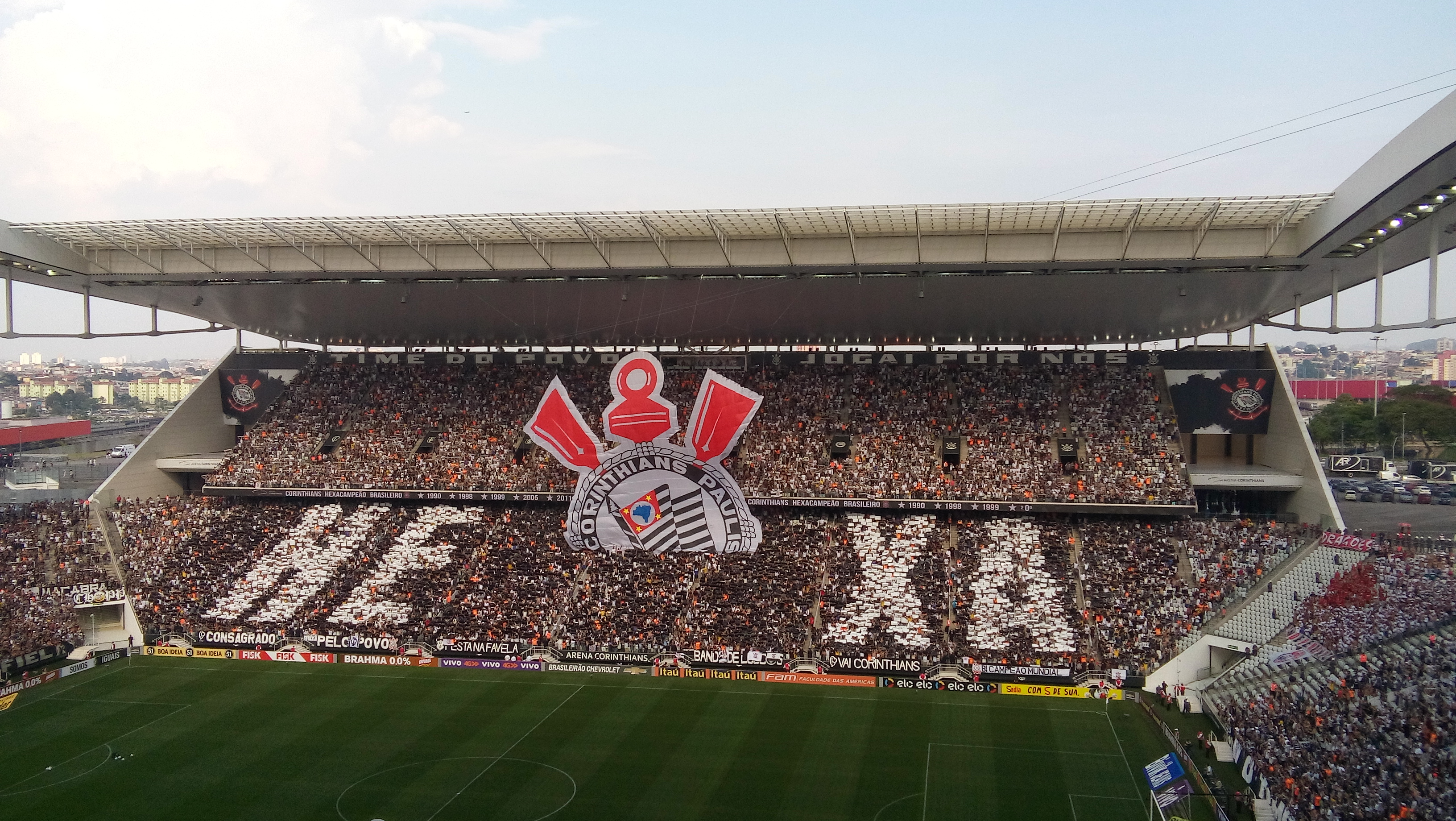 SCCP 6 x 1 SPFC - Mosaico 3D Arena Corinthians